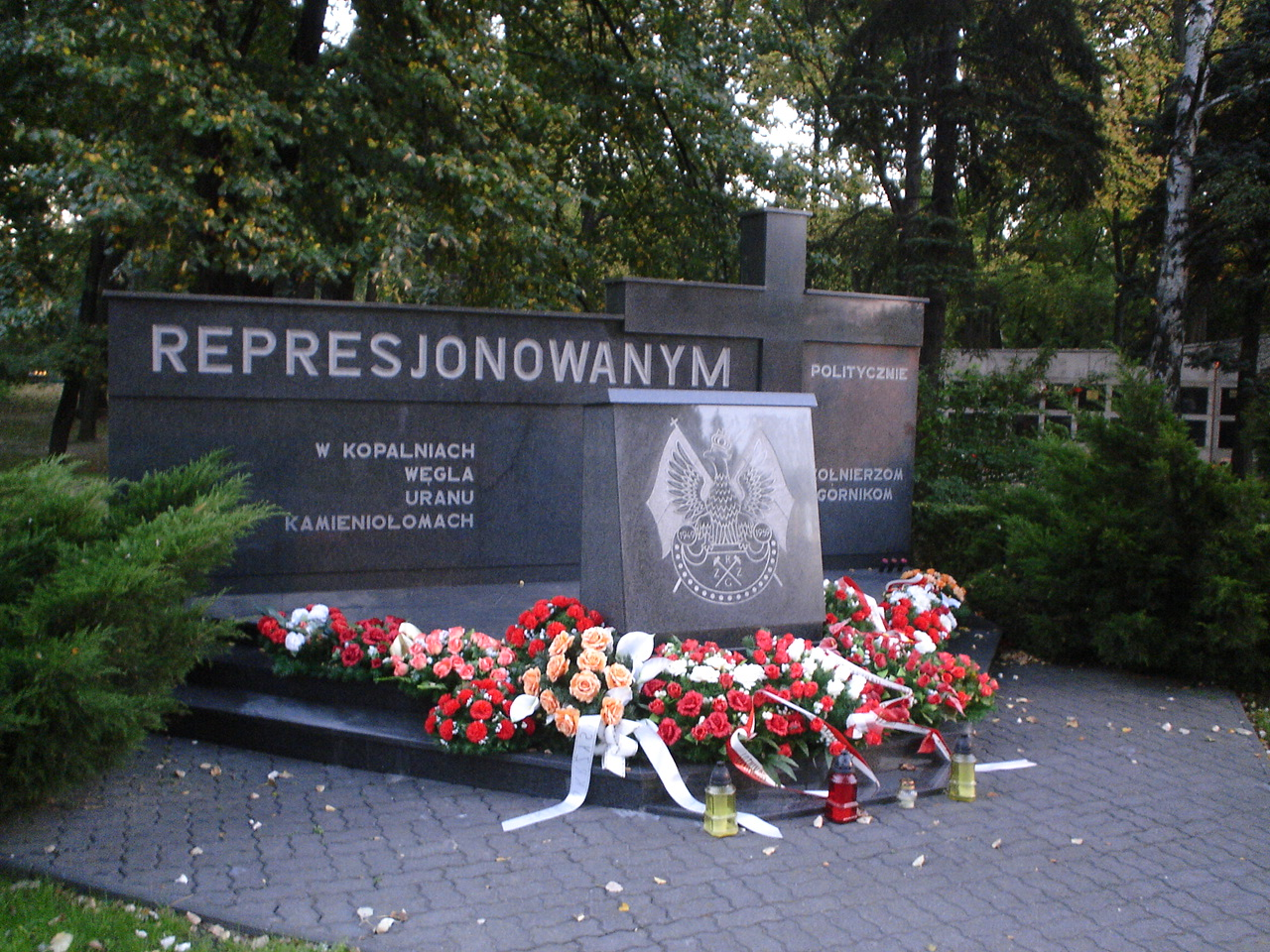 Pomnik represjonowanym w kopalniach węgla, uranu i kamieniołomach na Cmentarzu Wojskowym na Powązkach